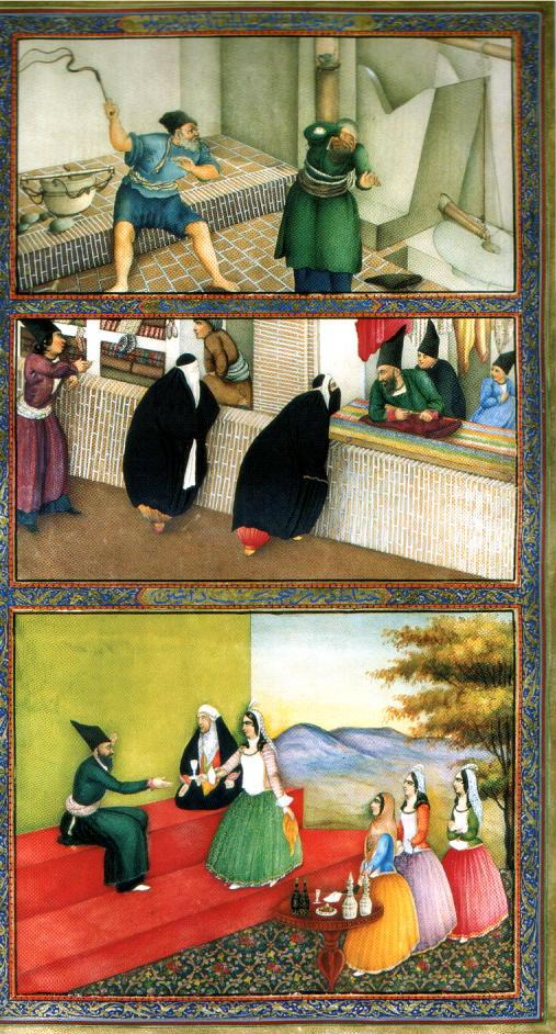 1001_nights_Гулистанская_библ._Тегеран